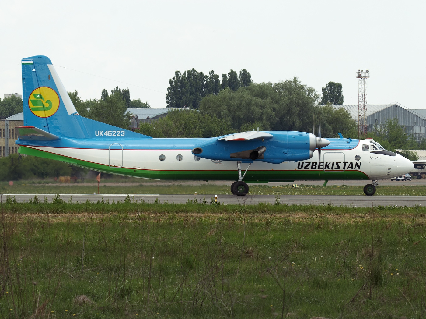 Uzbekistan Airways Antonov An-24B